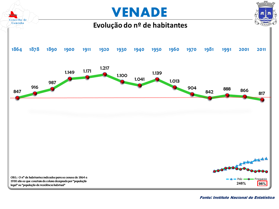 Censos 1864/2011